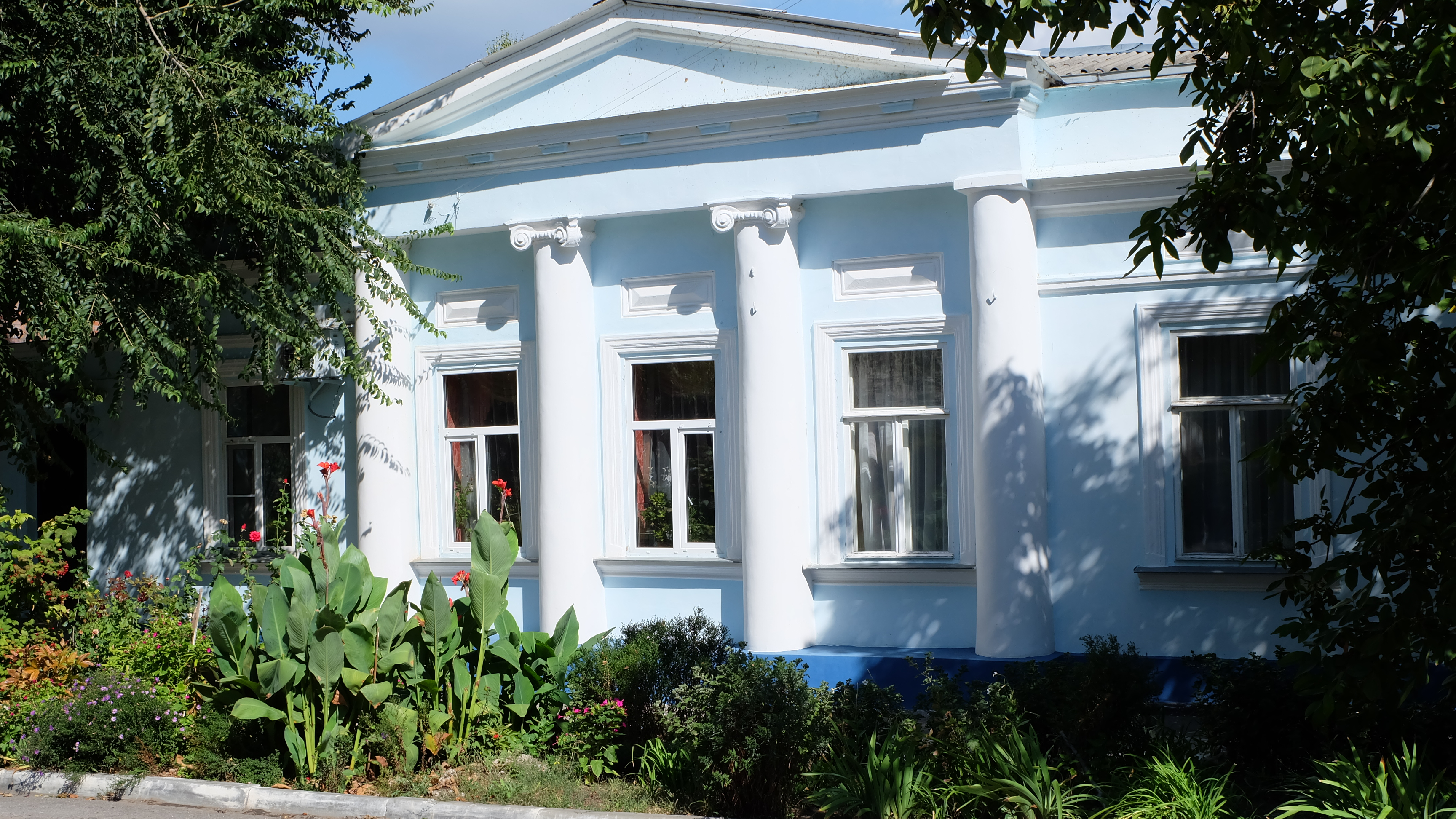 Жилой дом: улица Шмидта, 12, Таганрог, Ростовская область